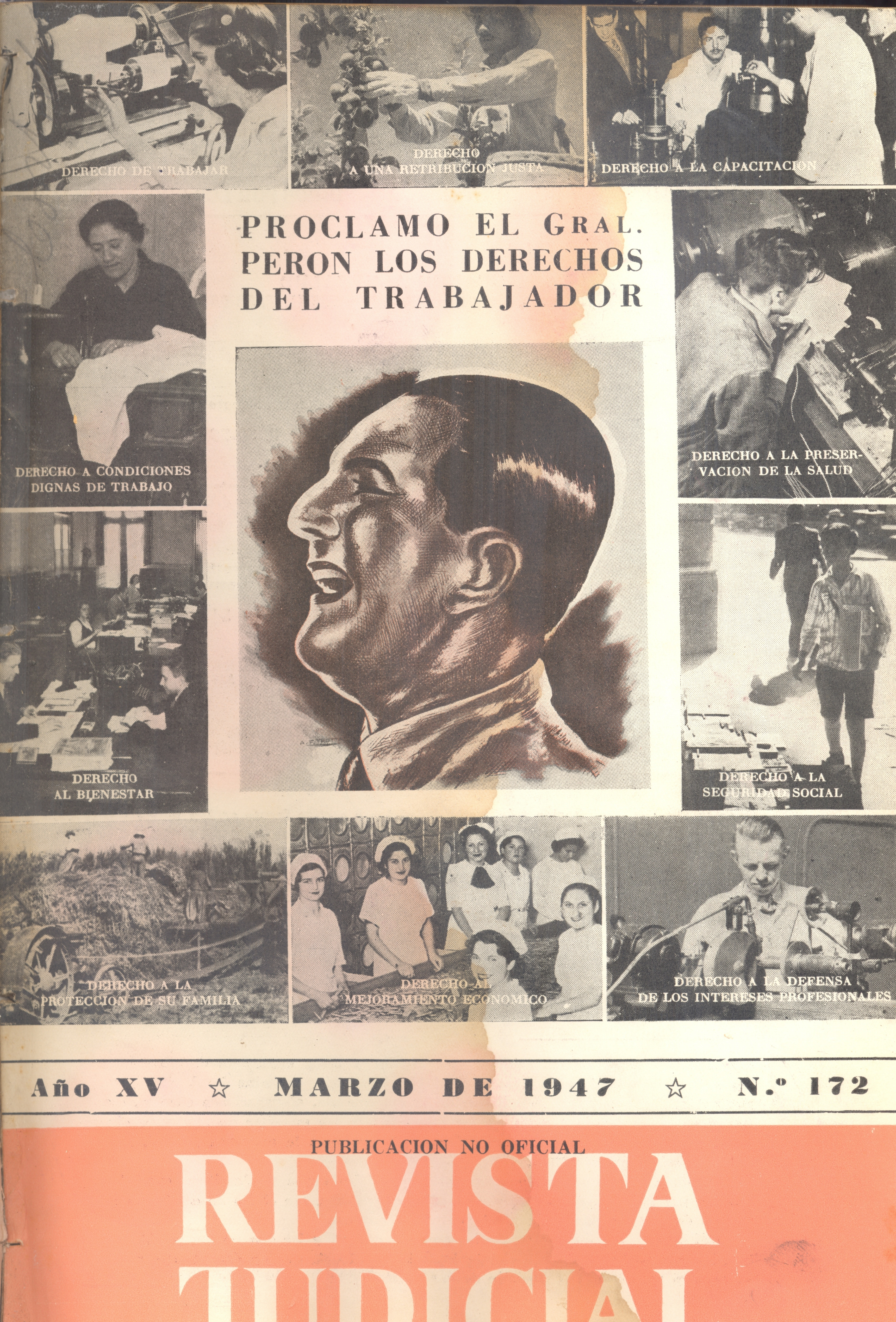 Revista Judicial nº 172: "Proclamó el Gral. Perón los derechos de los trabajadores".